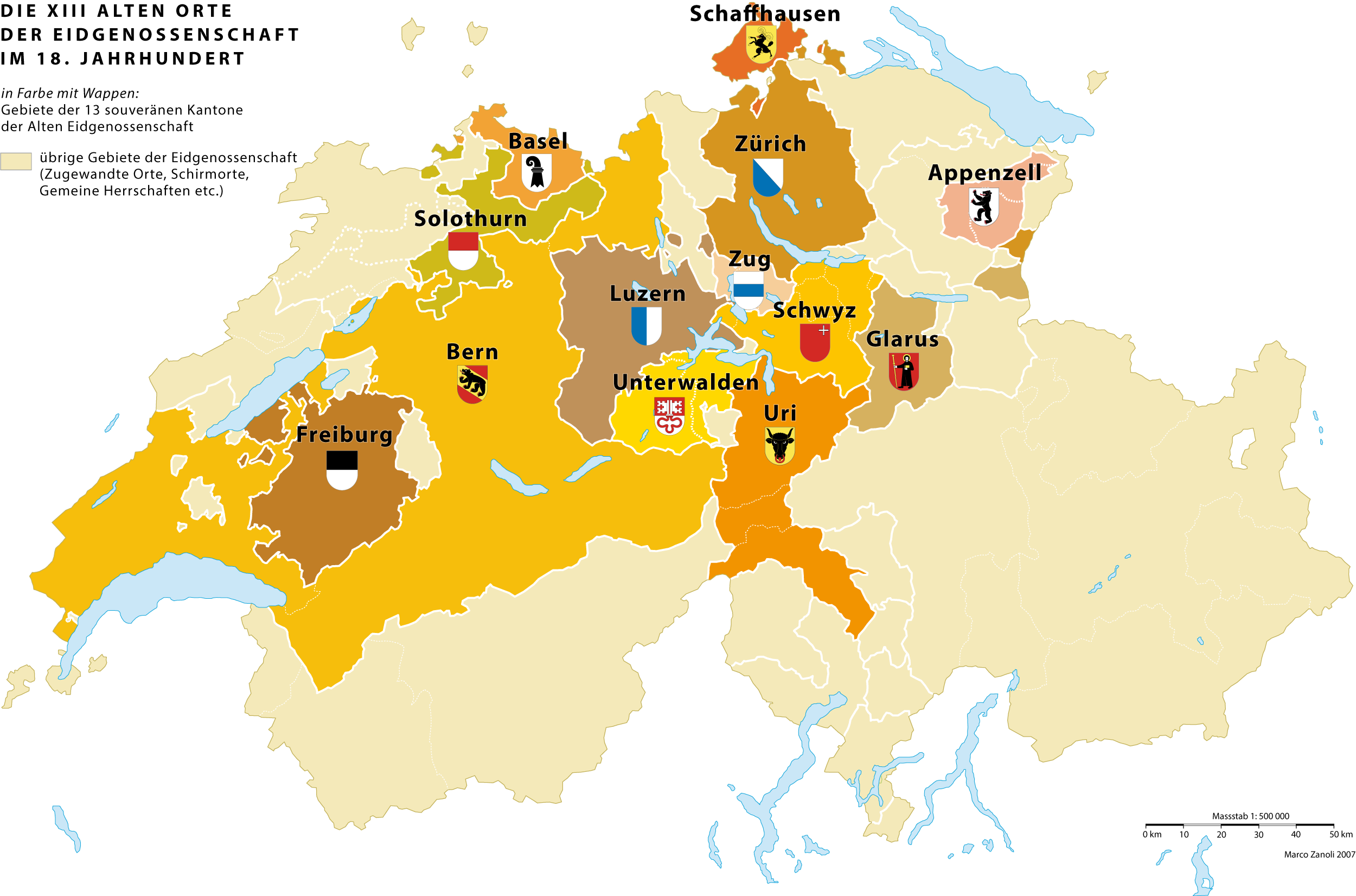 Die 13 «Alten Orte» (alte Kantone) der schweizerischen Eidgenossenschaft und ihr direkt beherrschtes Territorium im 18. Jahrhundert